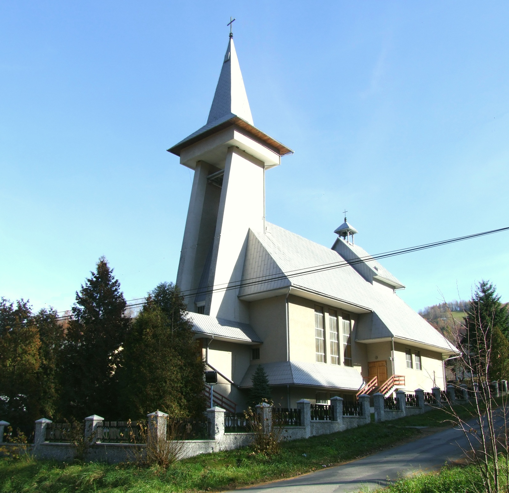 Kościół p.w. Trójcy Świętej w Obidzy